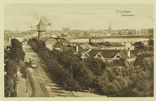 De Badhuisstraat te Vlissingen met de Watertoren en achter de villa's de Spuikom. 1905 - 1915 titel: Vlissingen Panorama 1 prentbriefkaart uitgever: Timmerman, Frans, Vlissingen serienr: 12 41530 locatieaanduiding: Vlissingen trefwoorden: toren; tram; Zeeuws Archief / Koninklijk Zeeuwsch Genootschap der Wetenschappen / Zelandia Illustrata prentbriefkaarten, cat.nr. ZI-P-03923